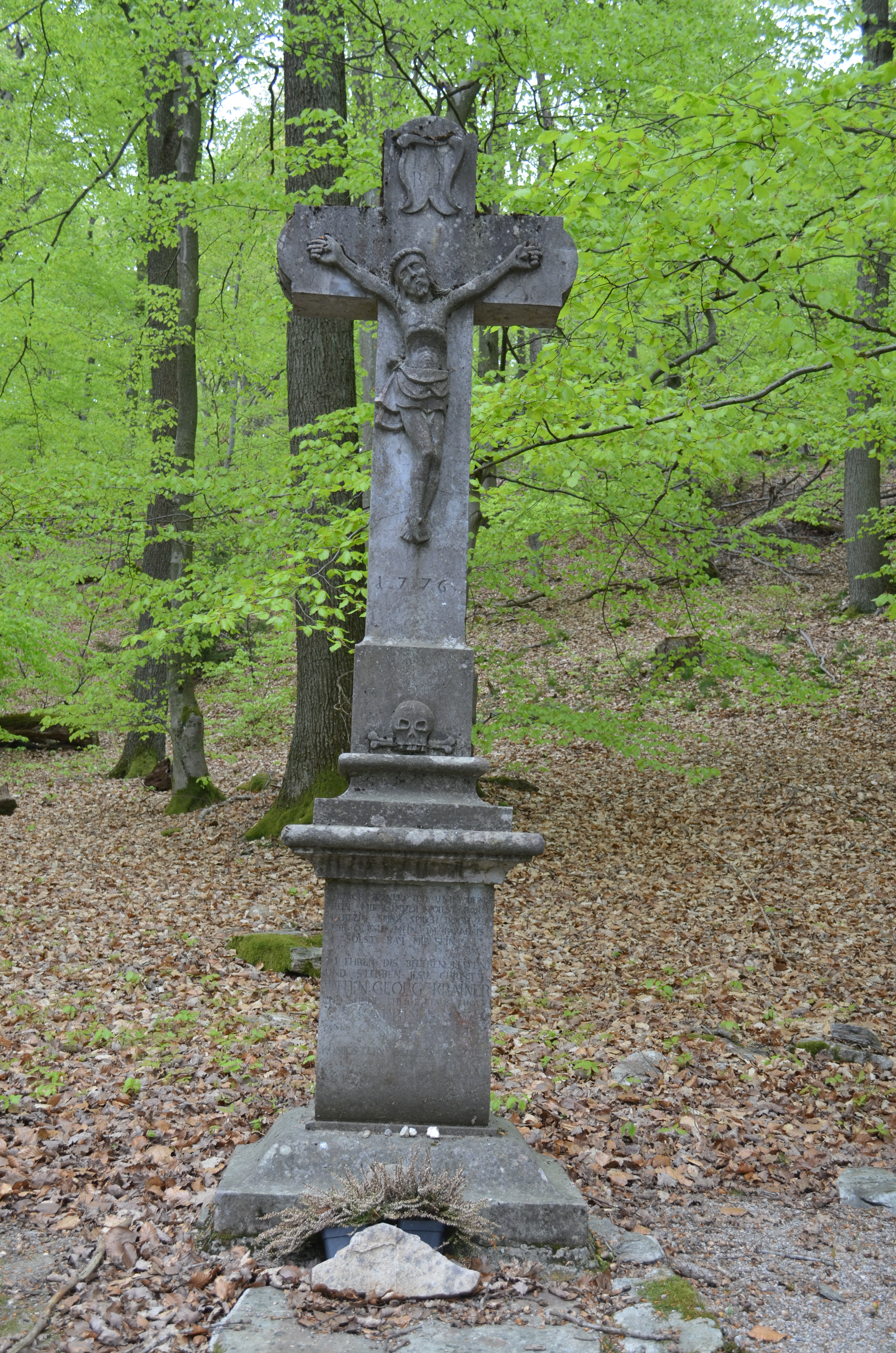 Königstein, Kreuzweg Romberg, Station 12, Mitte